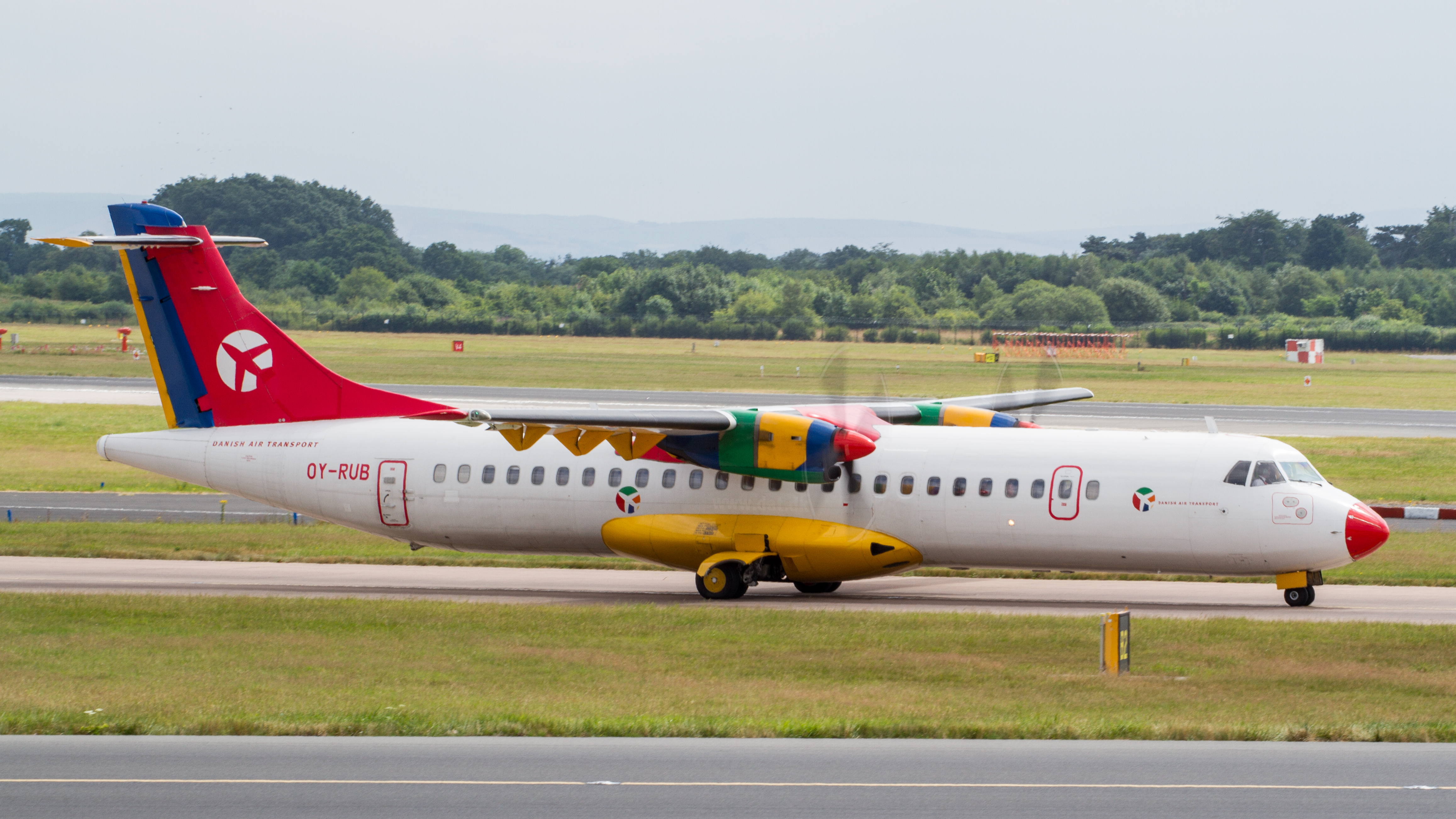 Manchester 20.07.13